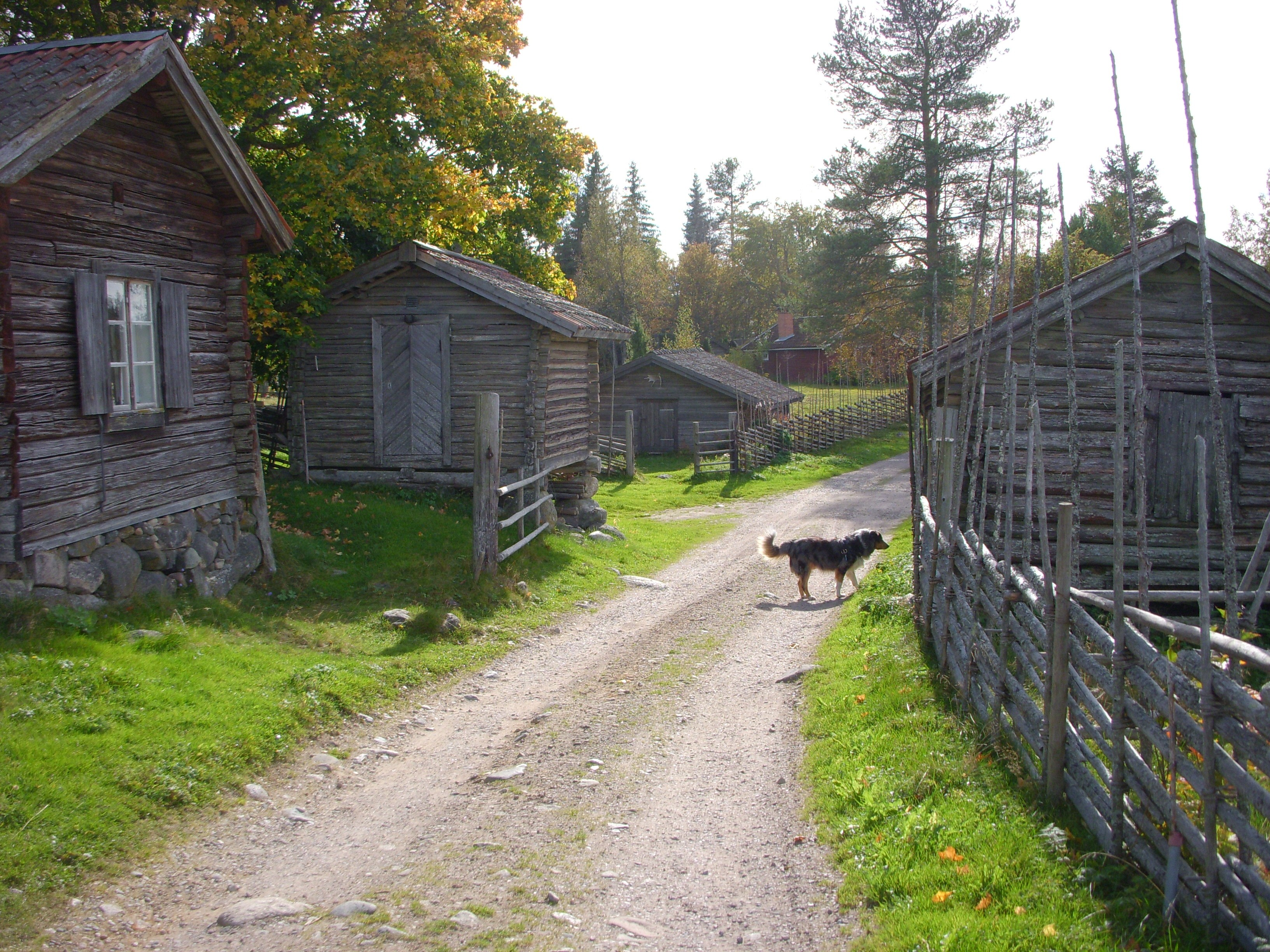 Bastbergets fäbodar, Gagnefs kommun, Dalarnas län